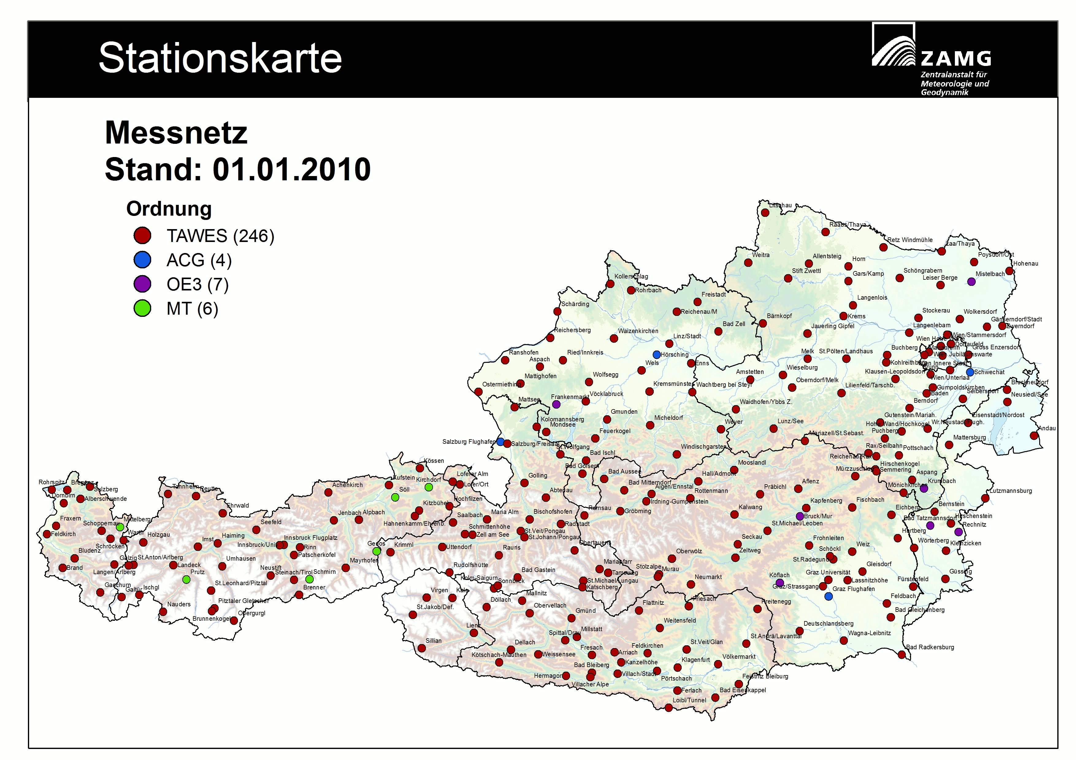 Stationsnetz der TAWES-Stationen ZAMG